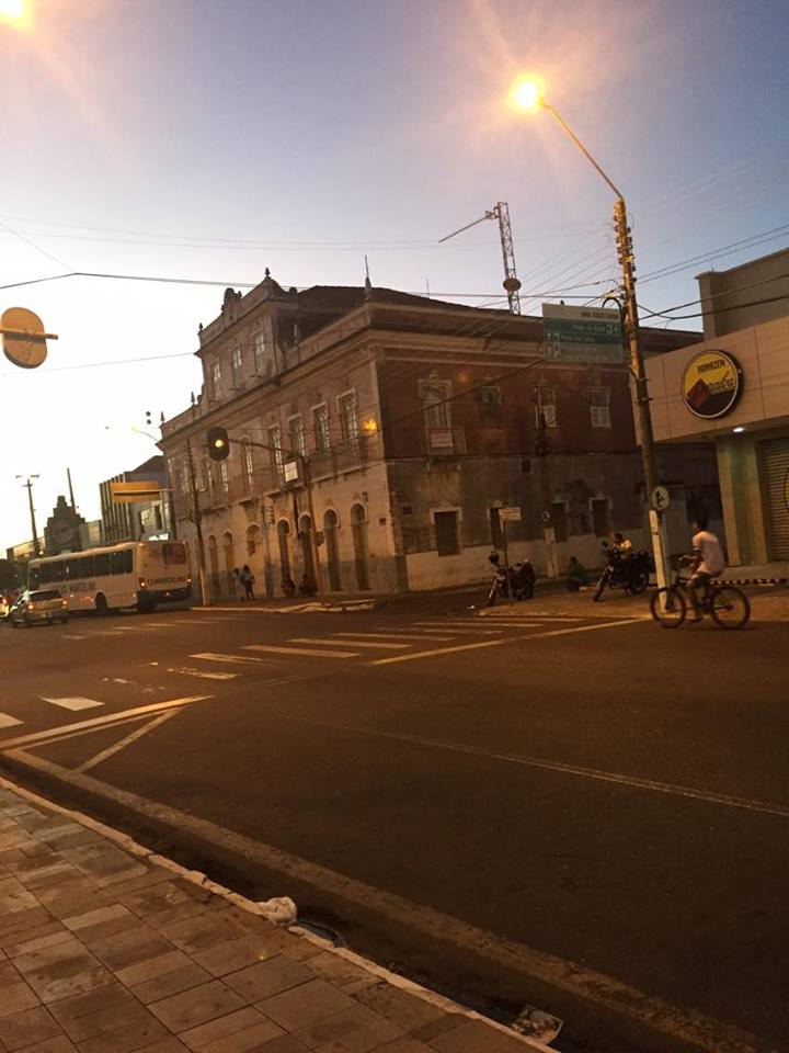 Casa Inglesa de Parnaíba a tarde.